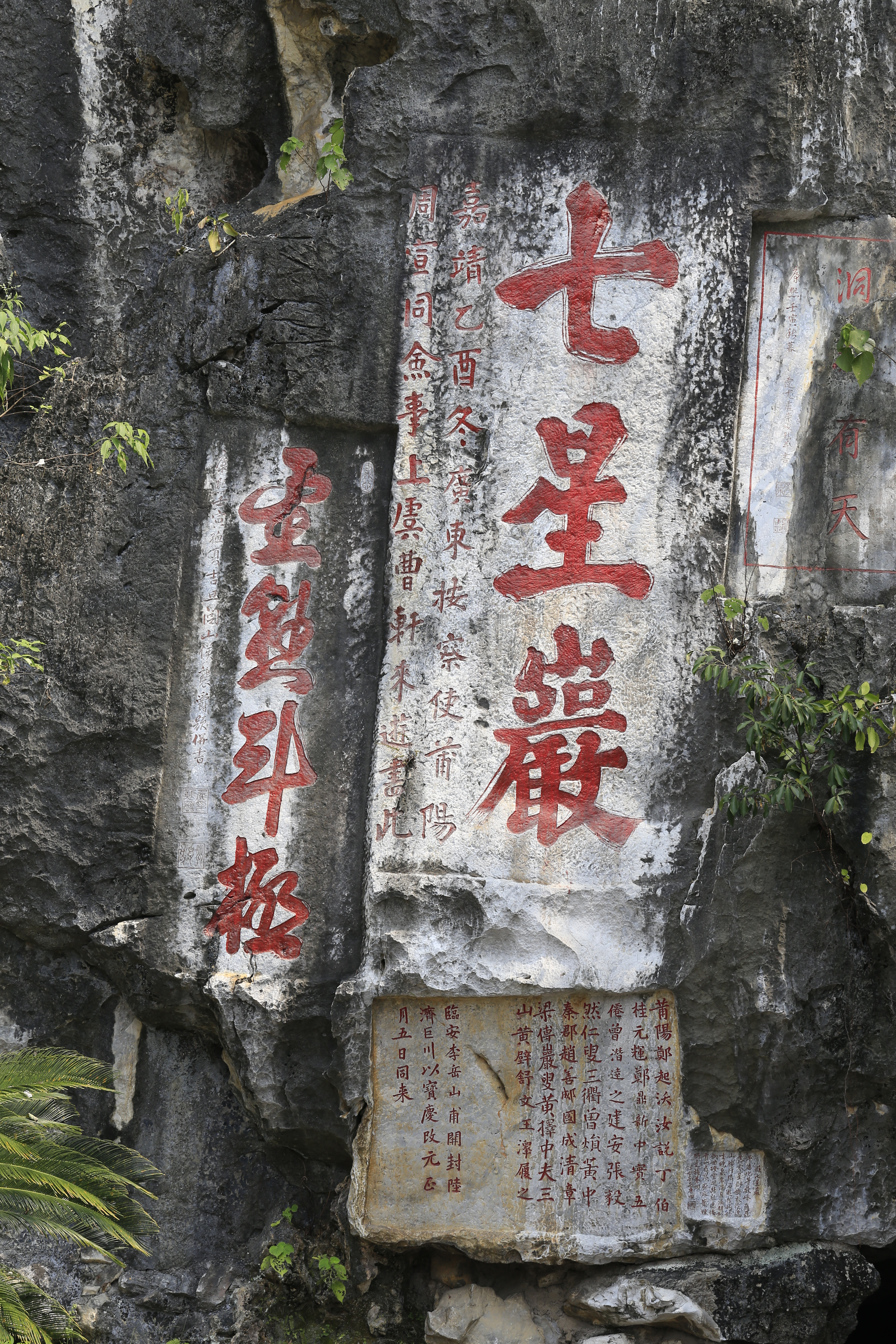 肇庆七星岩摩崖石刻